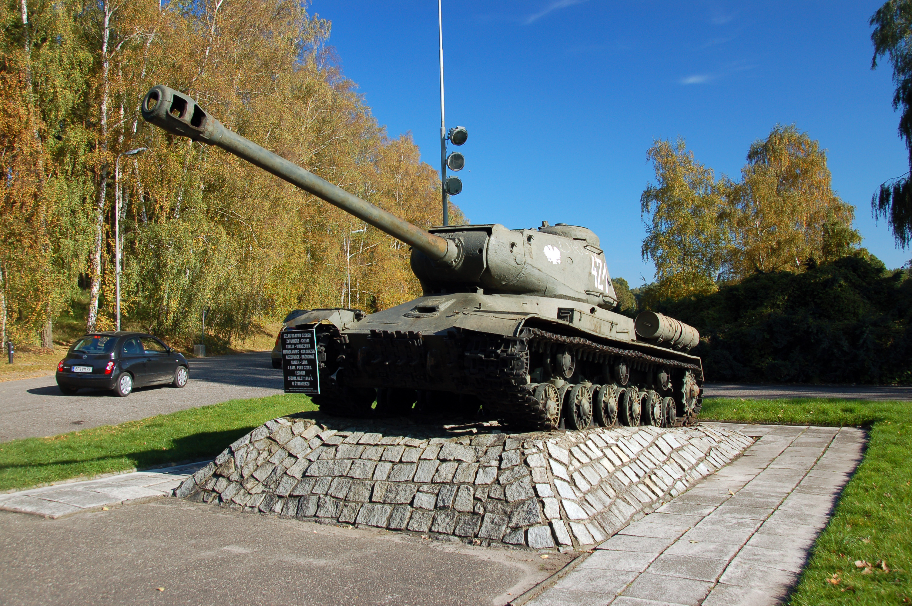 polnisches Oderbruch bei Siekierki polnischer IS-2